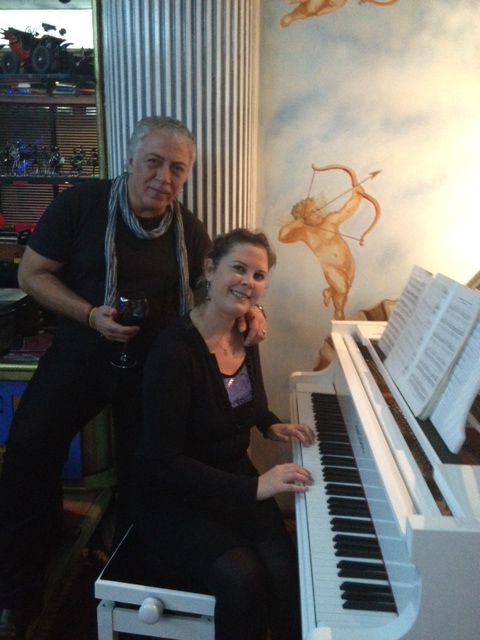 selçuk soğukçay ve hülya arslan soğukçay